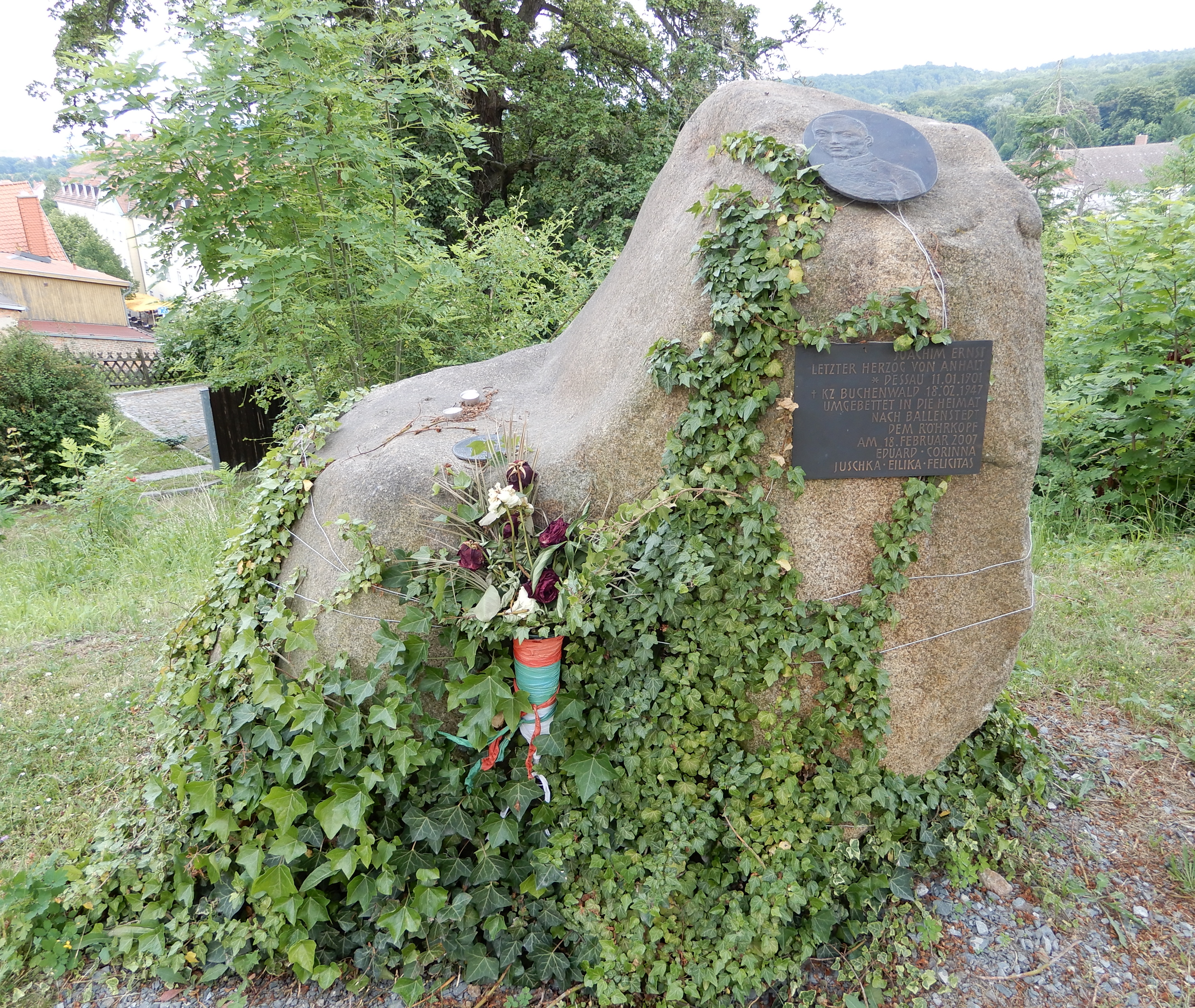 Gedenkstein für Joachim Ernst von Anhalt (1901-1947)